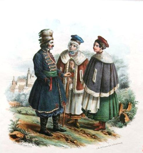 Mieszczanie ode Lwowa - litografia ręcznie kolorowana sygnowana na kamieniu: J.Wittmann i lith. de Simon fils a Strasbourg - pochodzi z: Zienkowicz Leon - ""Les Costumes du Peuple Polonaise" - Paryż 1838 -1841